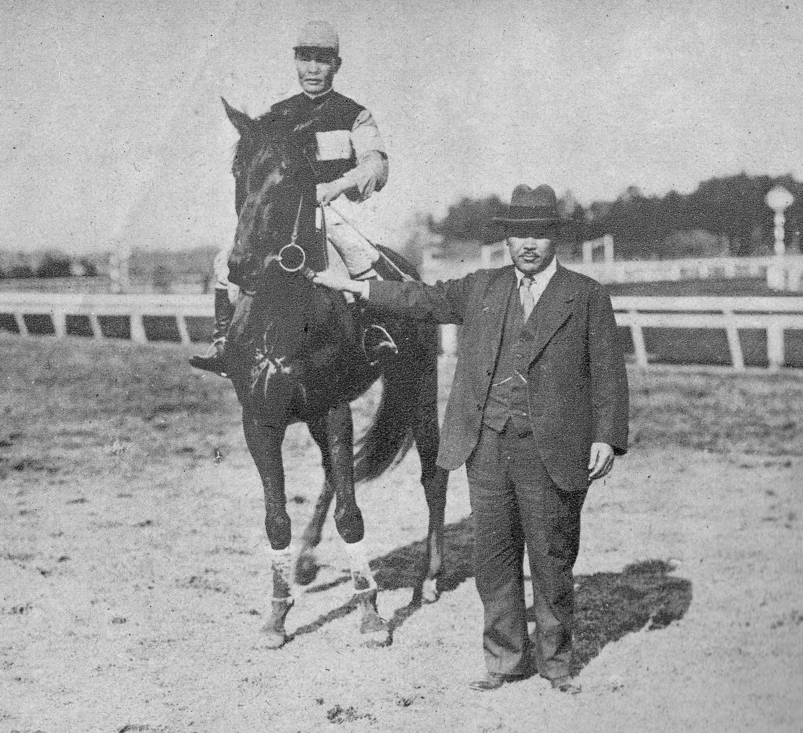 中山大障碍勝利時のイサハヤ